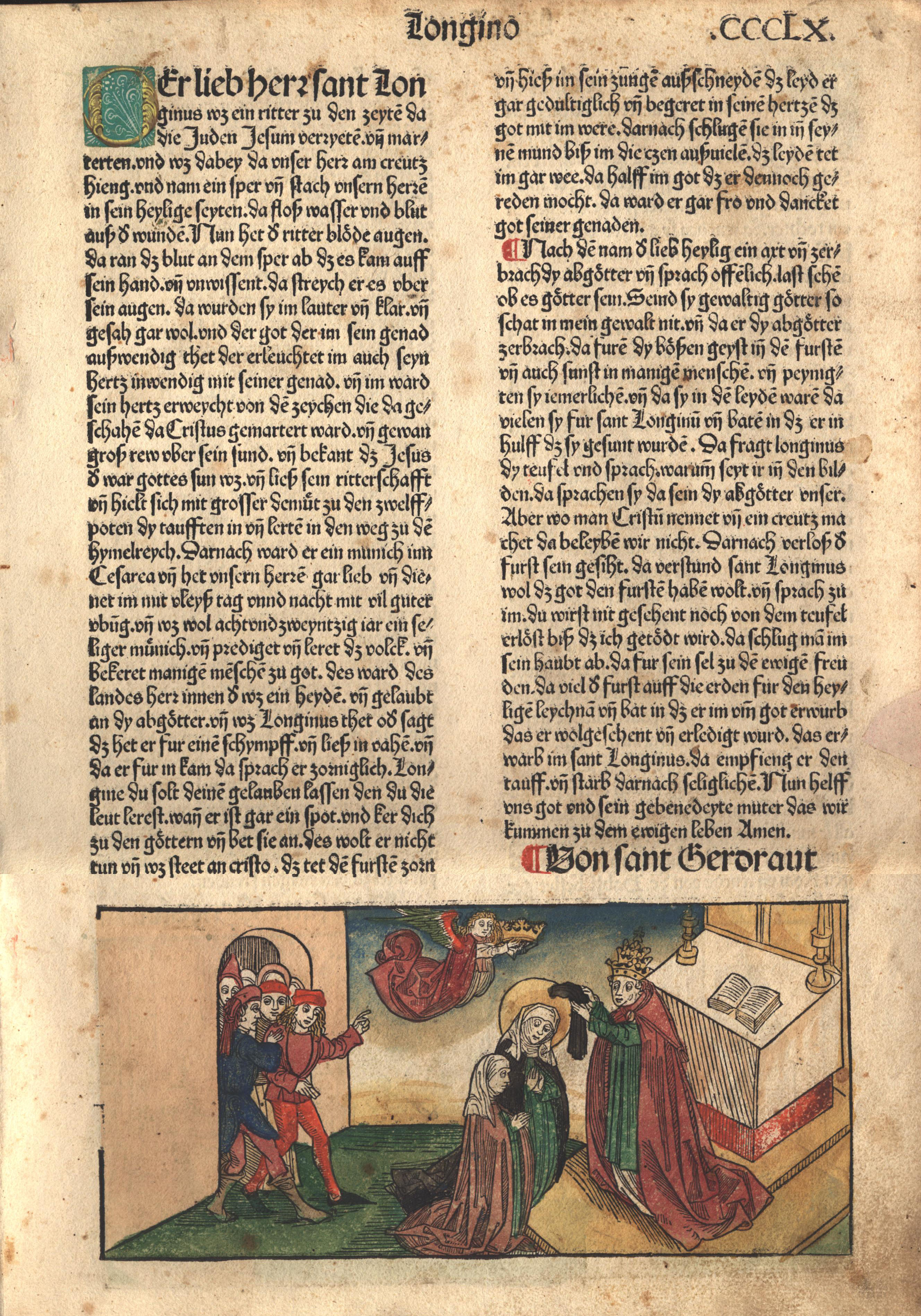 Folio Page from "The Golden Legend" printed by Anton Koberger, 1488. The image depicts a saintly woman being anointed, possibly St. Mary or any number of other female saints.